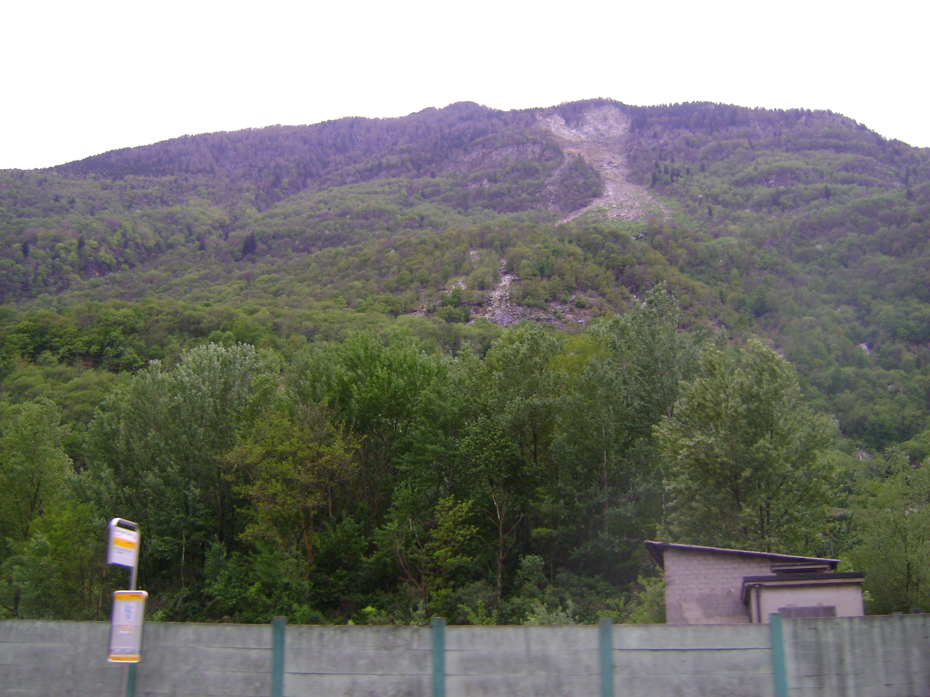 La frana del Valegion